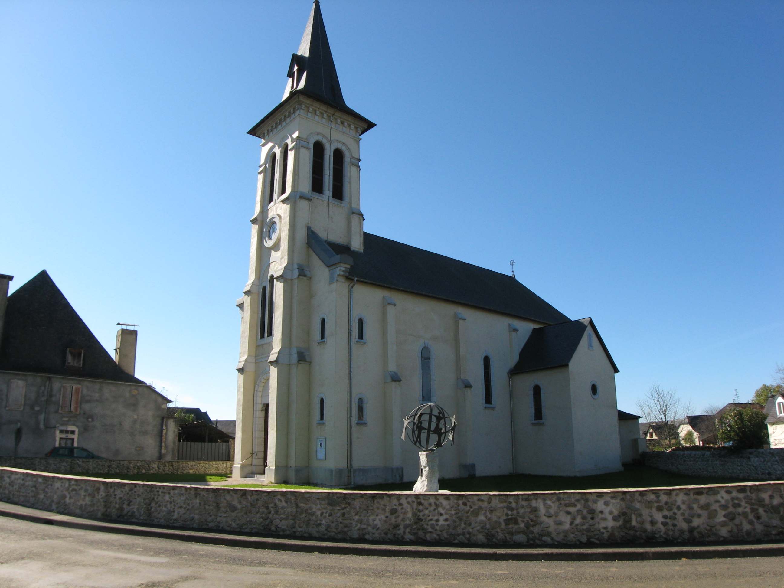 Vue de l'église Saint Jean Baptiste de Goes (XIXè) (Pyrénées Atlantiques) Pyrénées).